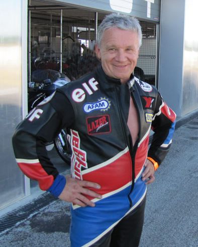 A Nogaro en 2010 - Démonstration de motos et sides anciens